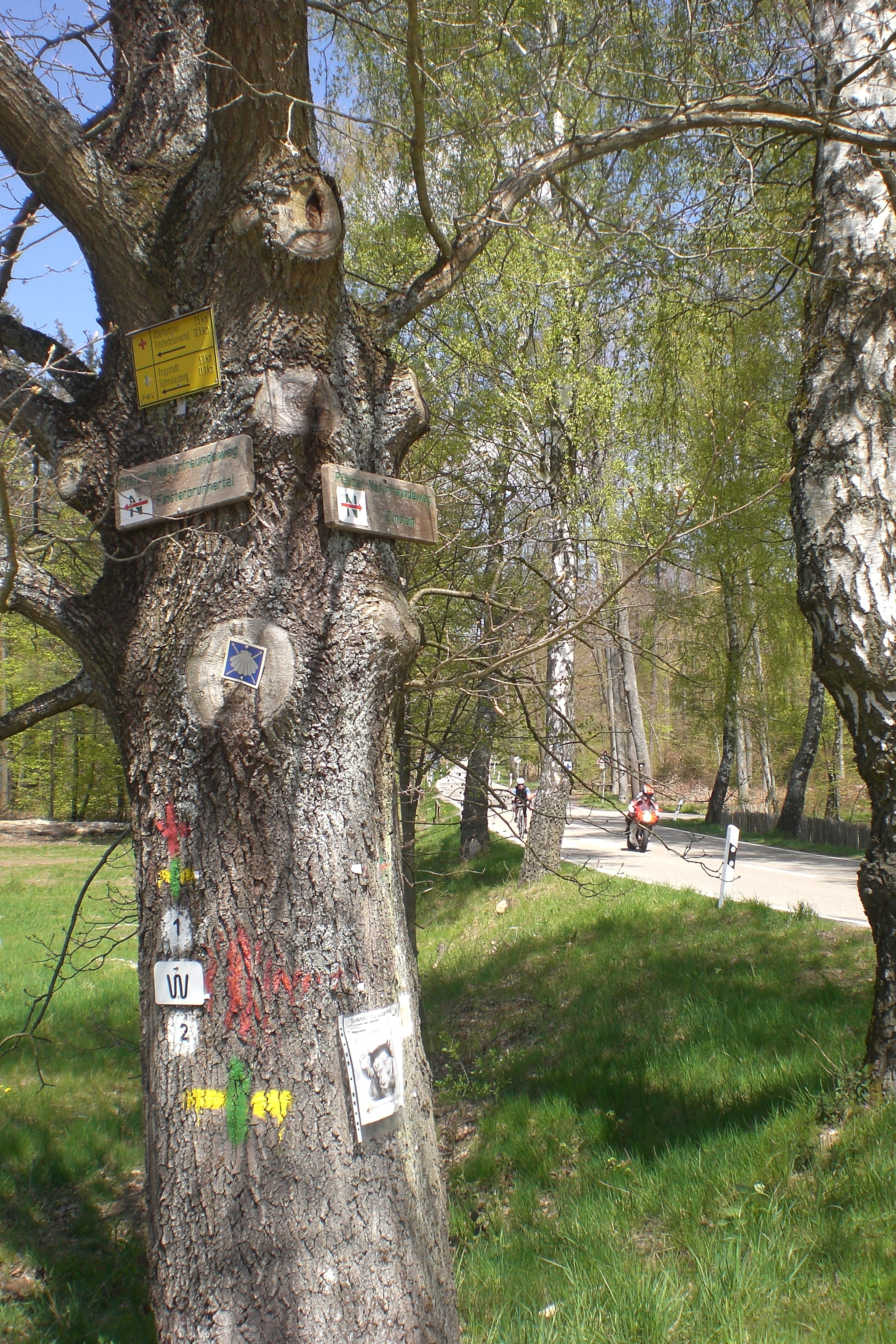 Wegmarkierung in Johanniskreuz